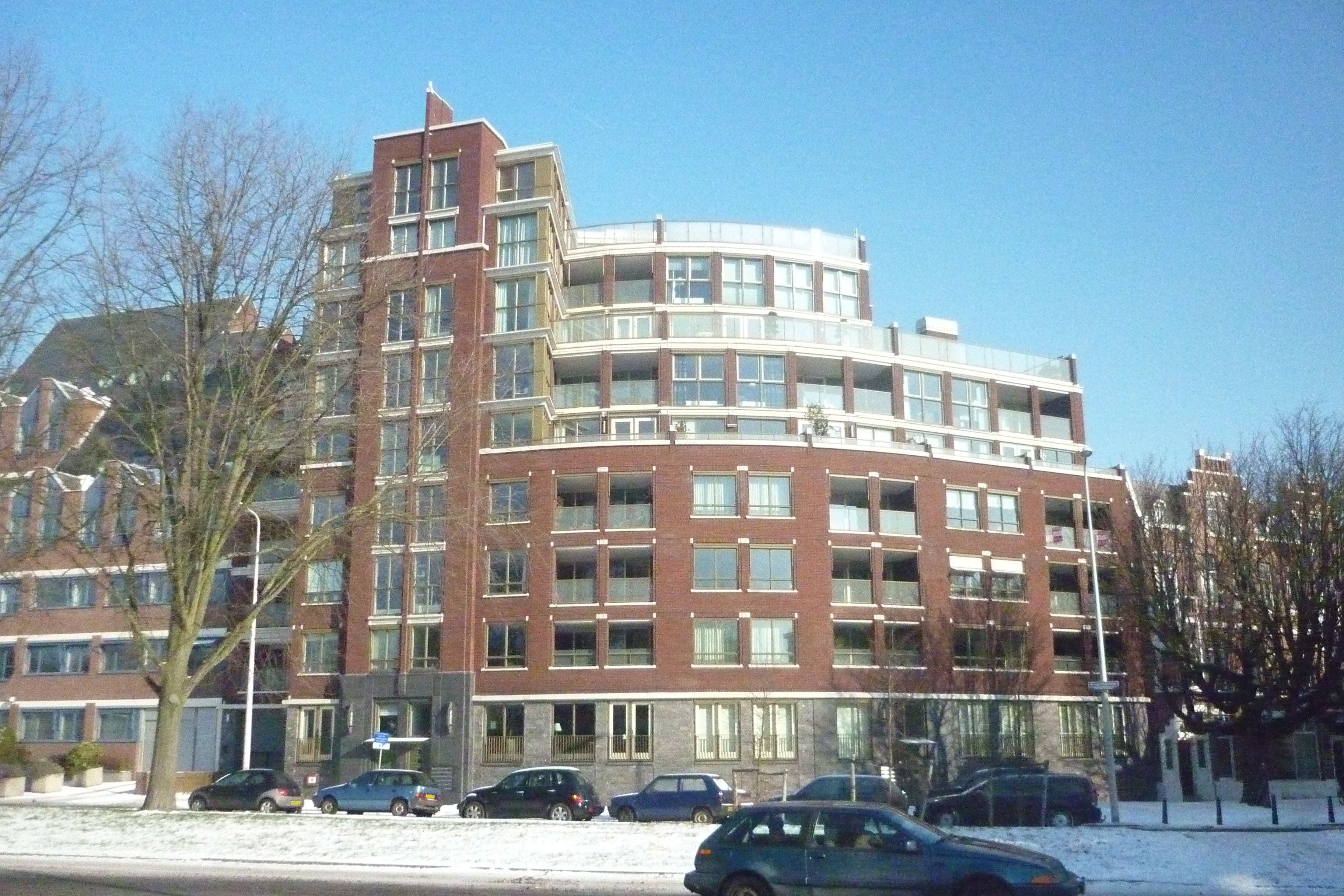 Metropole